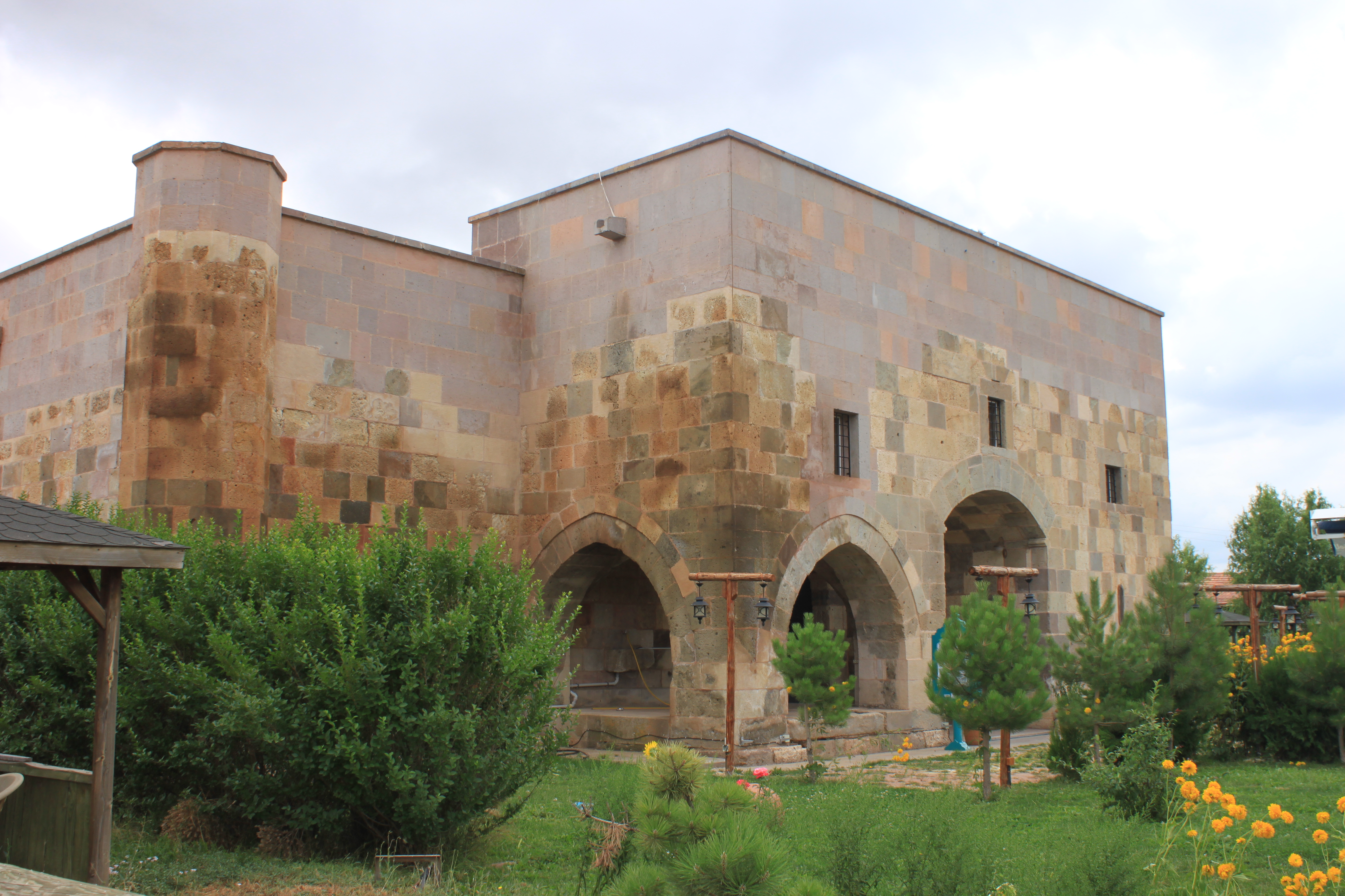 Blick von Südwest auf den Eingangsbereich des Kızılören Han, erbaut von 1205-06; Kreis Meram, Provinz Konya.